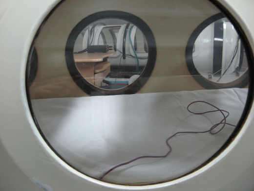 Pogled kroz jednomesnu hiperbaričnu komoru